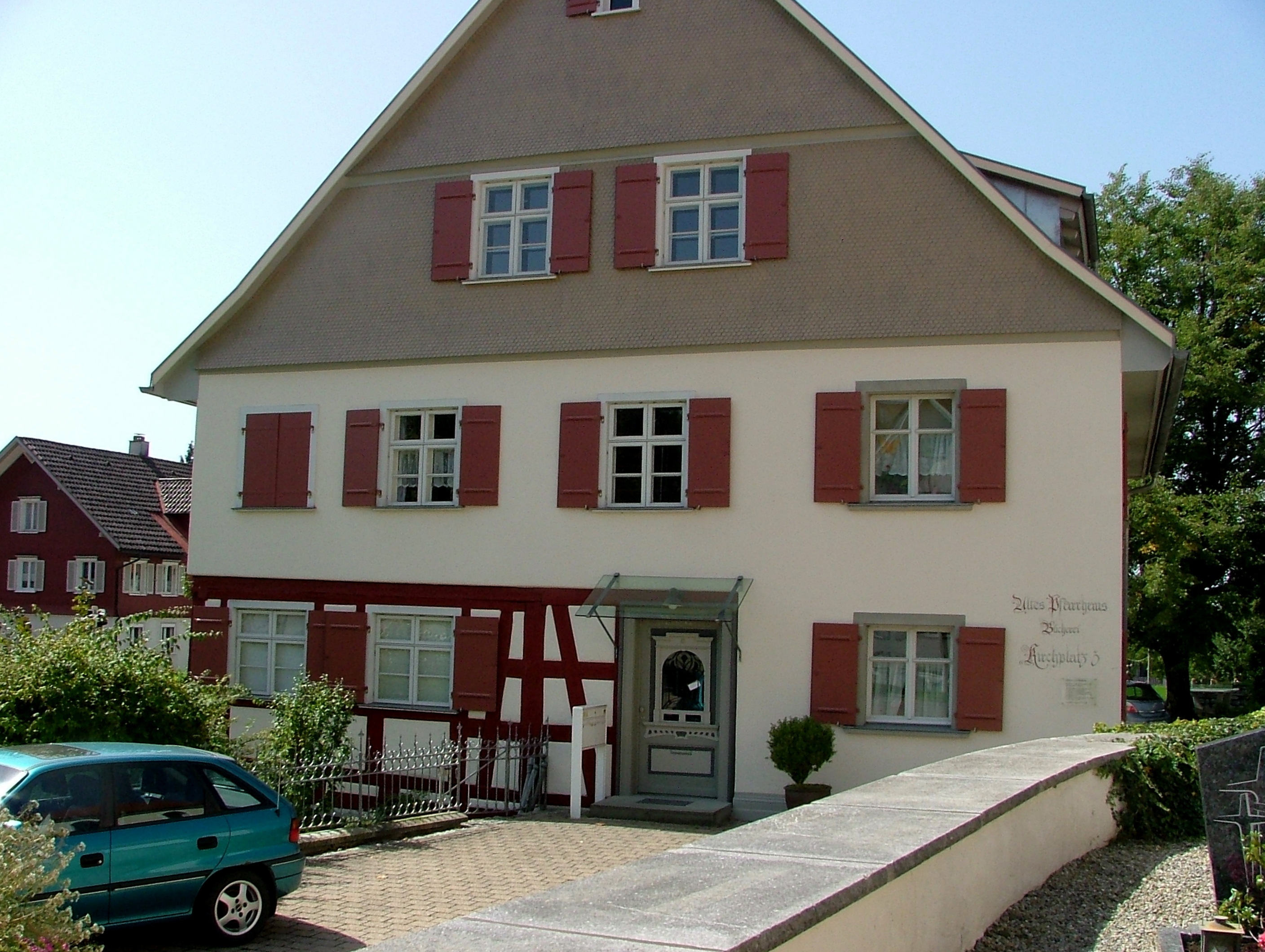 Pfarrhof